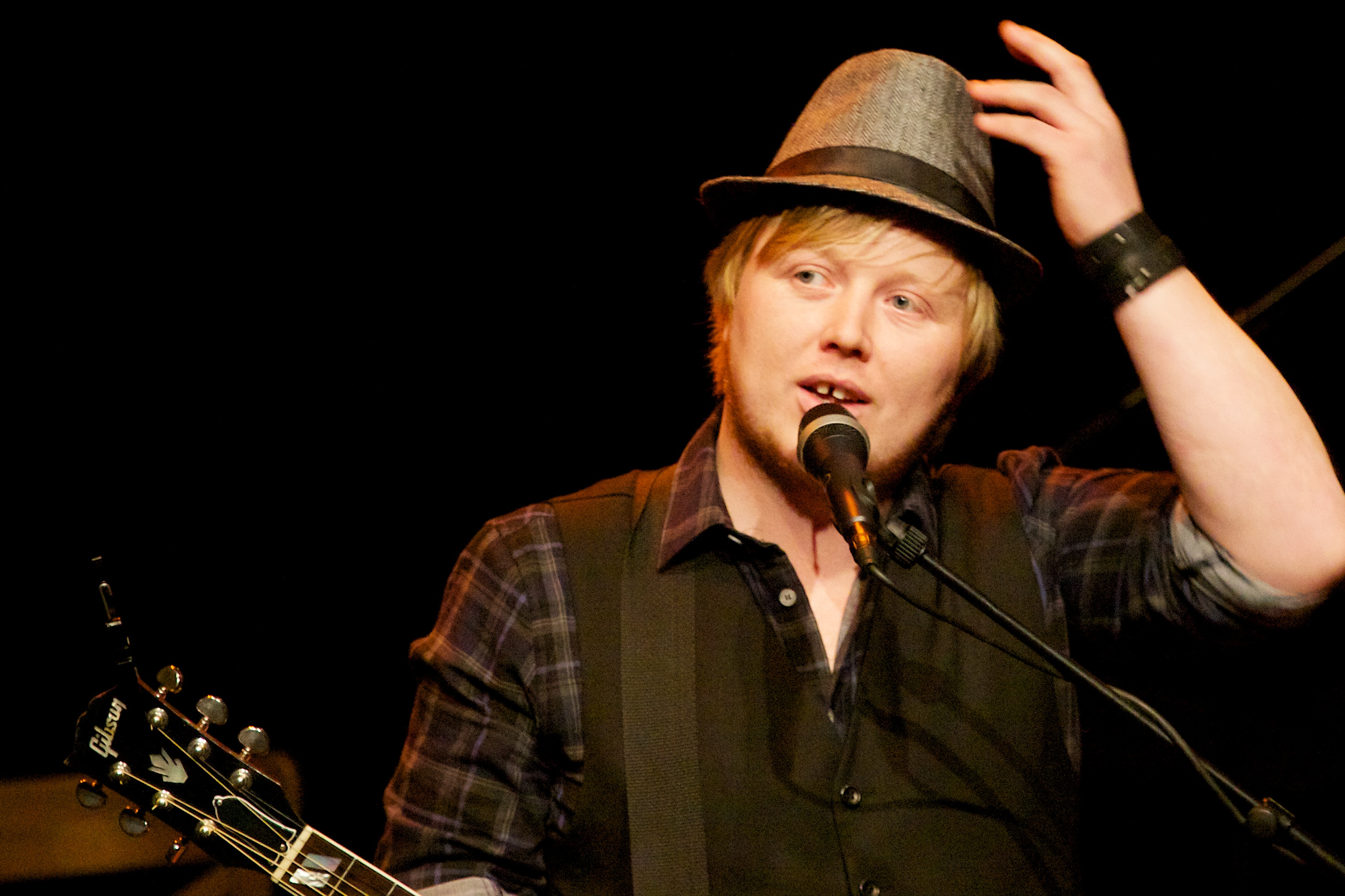 Kurt Nilsen en concert